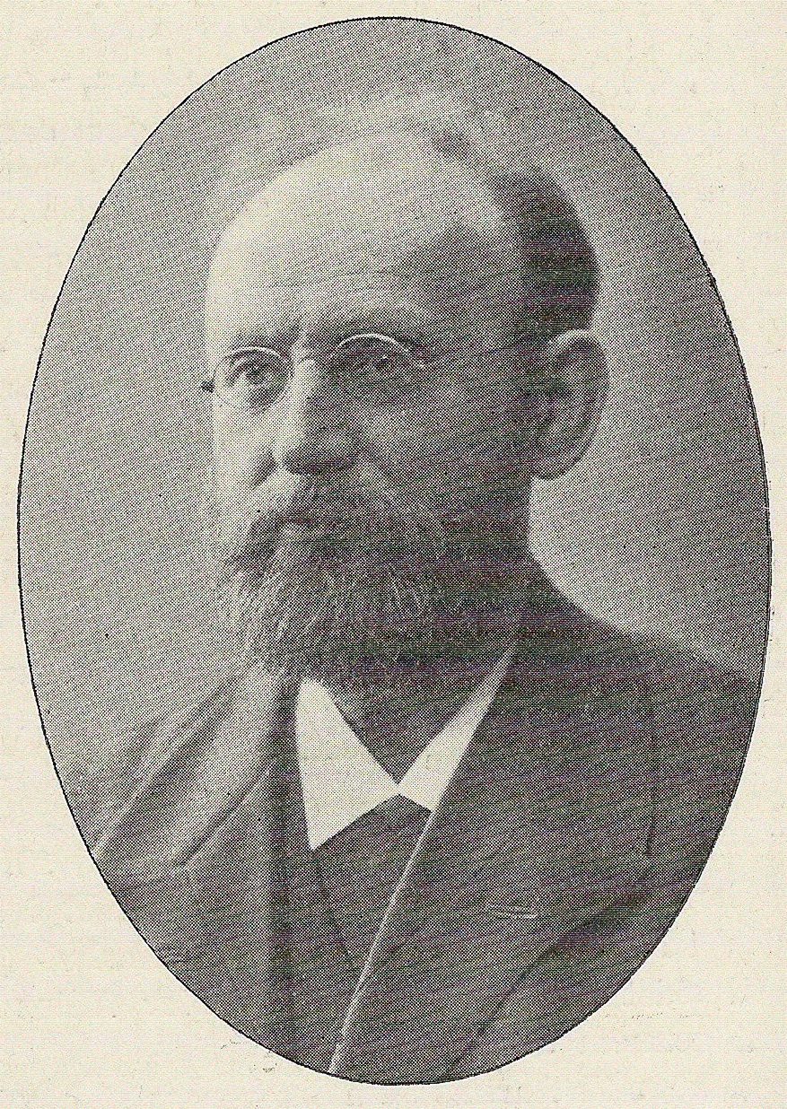 Fotografi af komponisten Arthur Ivan Allin